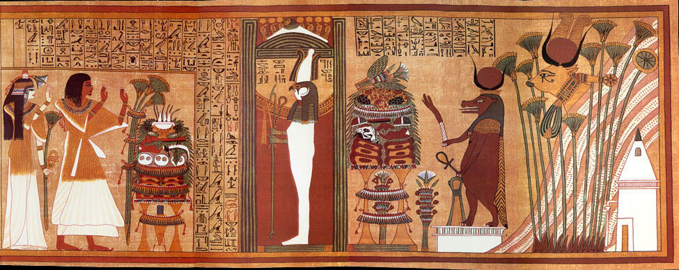 Scene finale du papyrus d'Ani